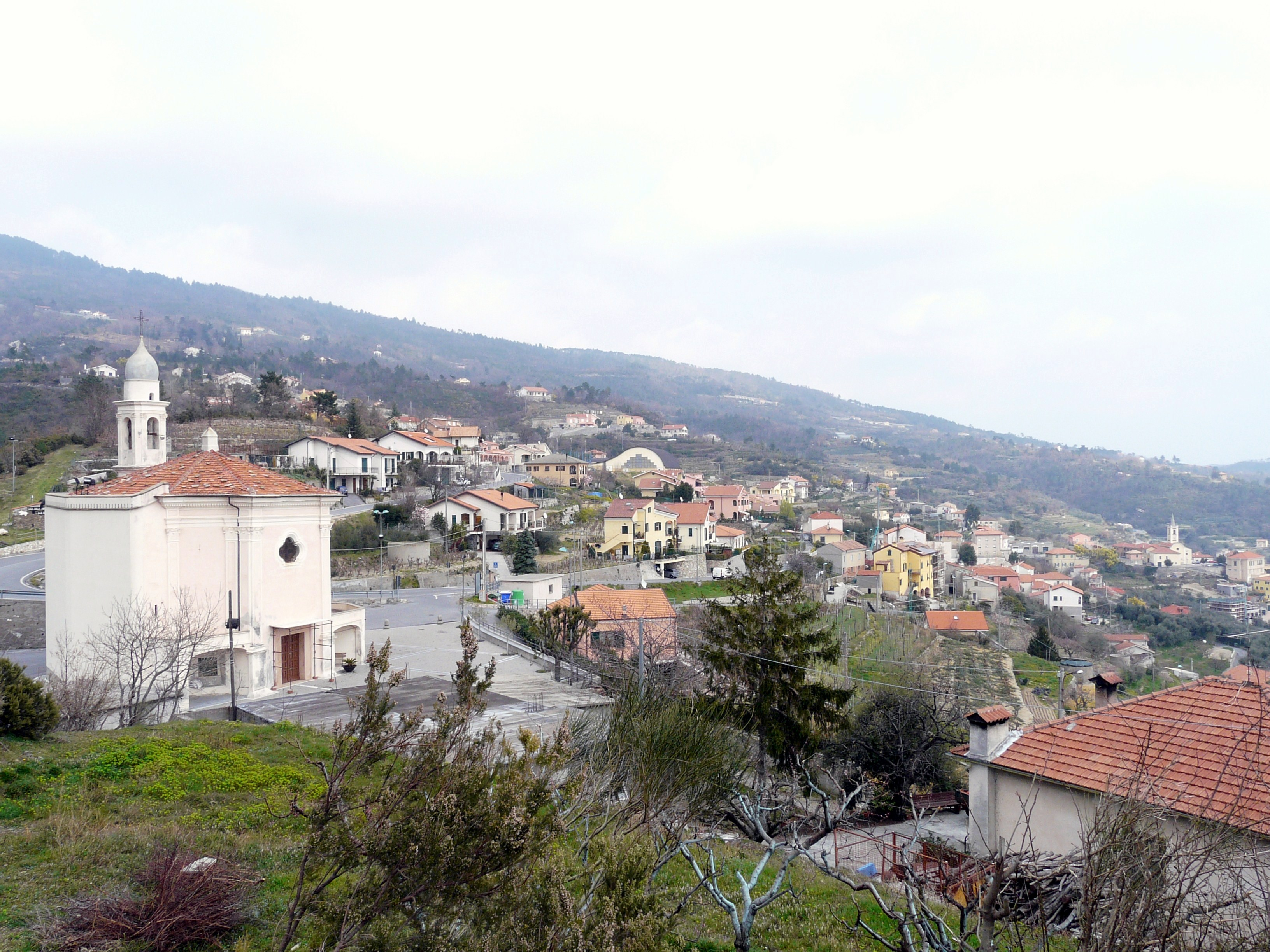 Magliolo, Liguria, Italia